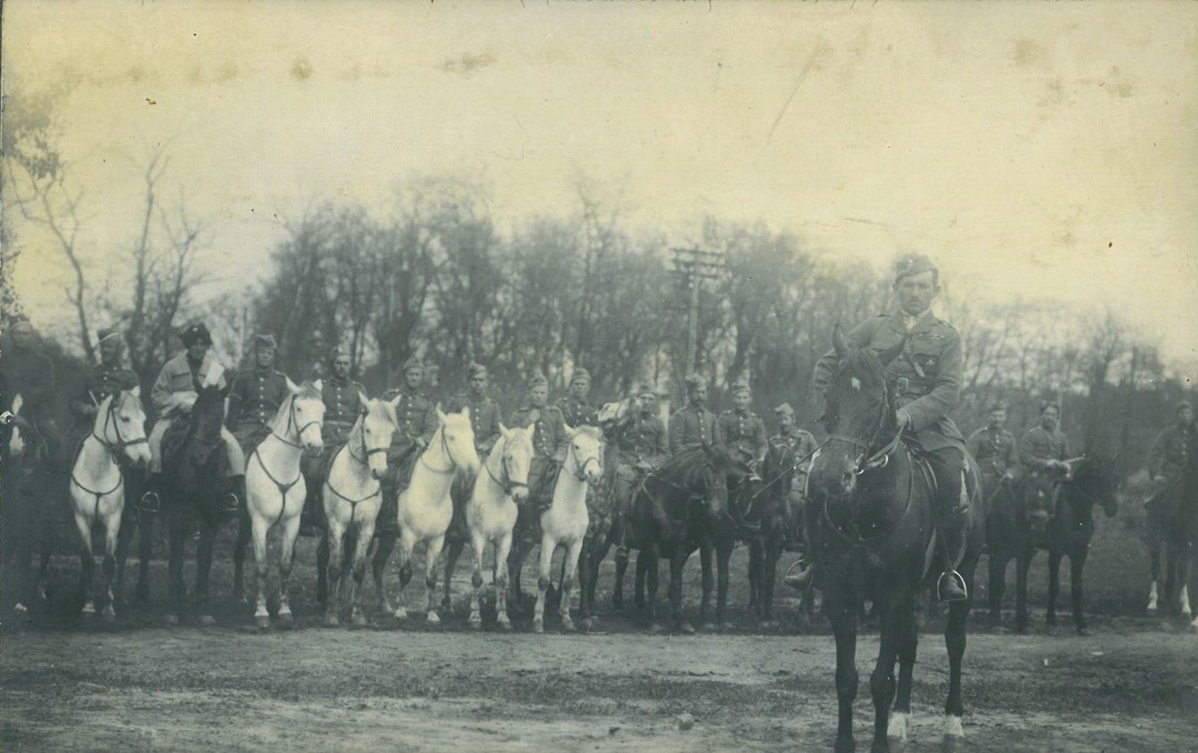 Беларуская (тарашкевіца): Штаб групы Булак-Балаховіча. Берасьце, 1920.